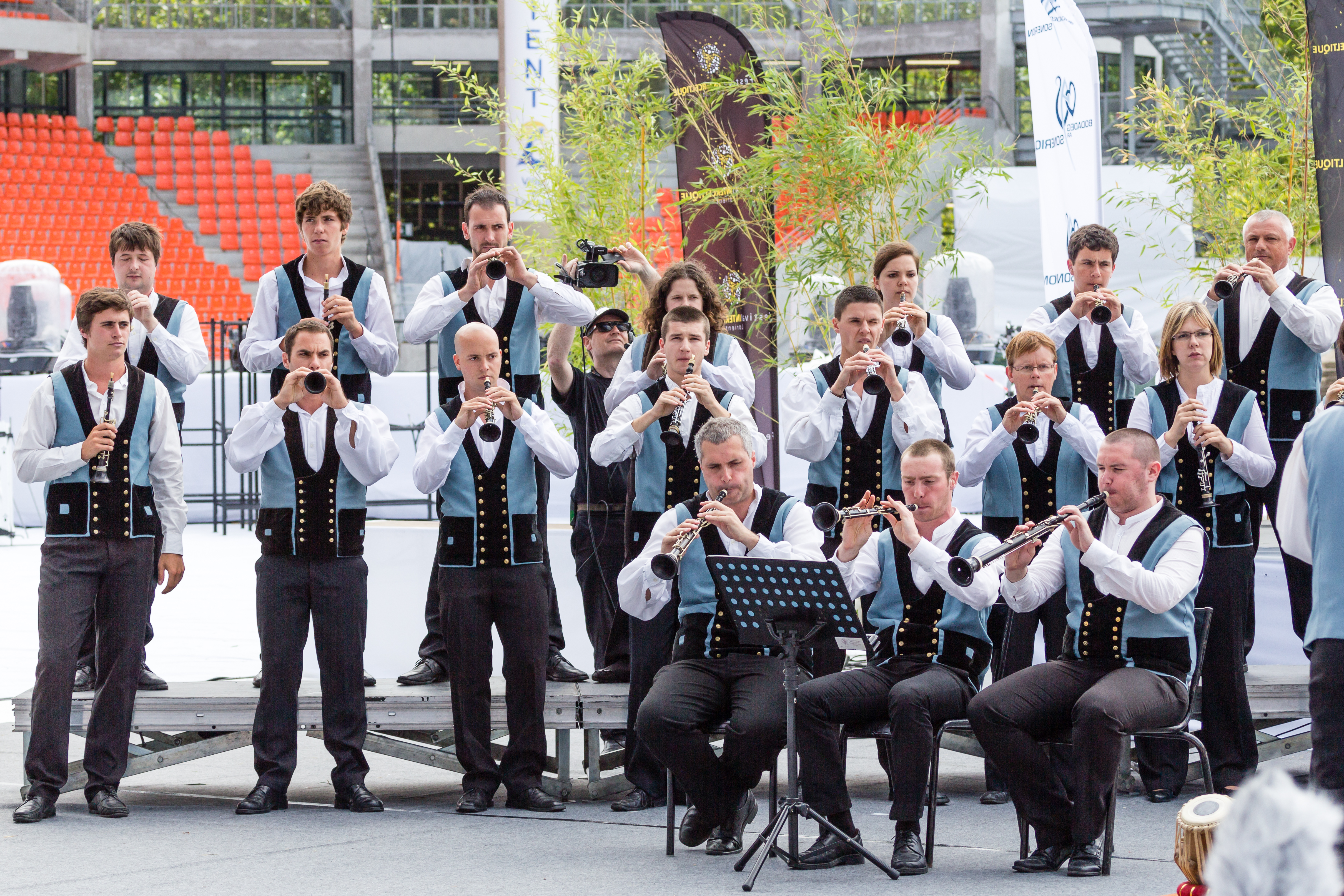 Le bagad Melinerion lors du championnat national des bagadoù (première catégorie) au FIL 2012.